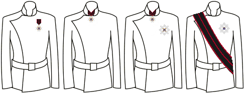 Modo di indossare le decorazioni dell'Ordine di San Silvestro Papa (Stato Pontificio - Città del Vaticano)